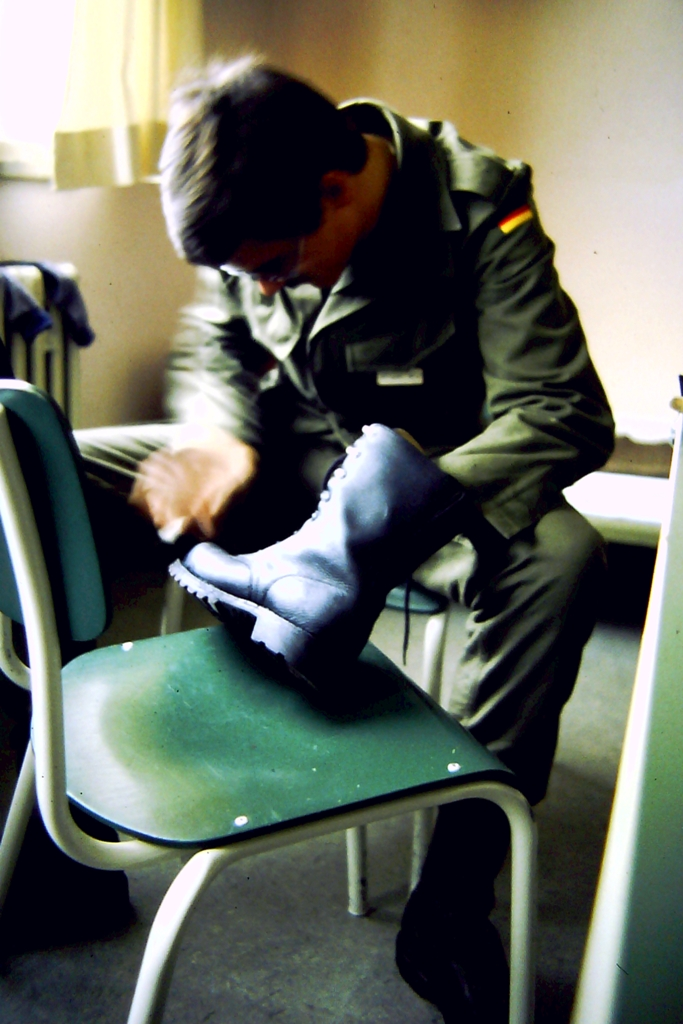 Bundeswehrsoldat im Jahr 1982 bei der Schuhpflege (Wichsen).